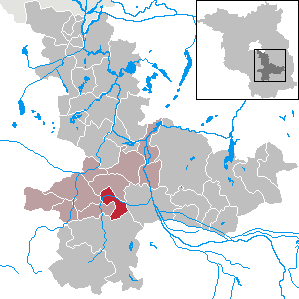 Bersteland in Brandenburg (Country) - District Dahme-Spreewald